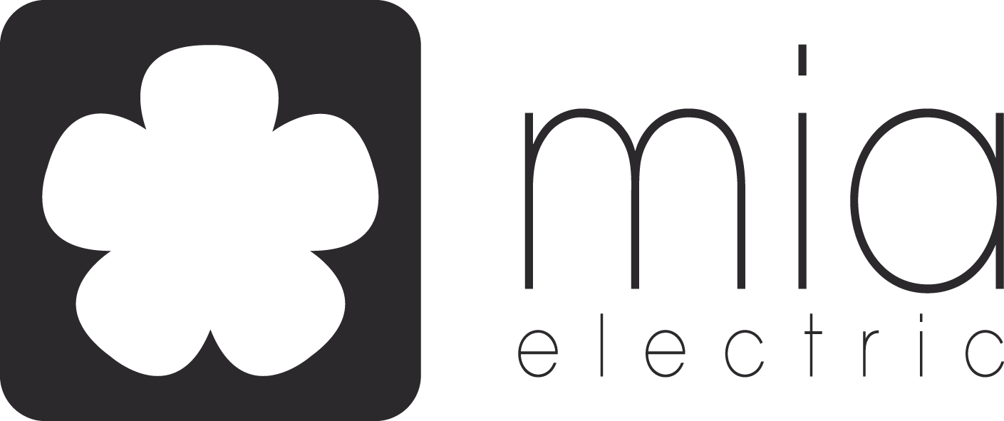 Das Logo von mia electric